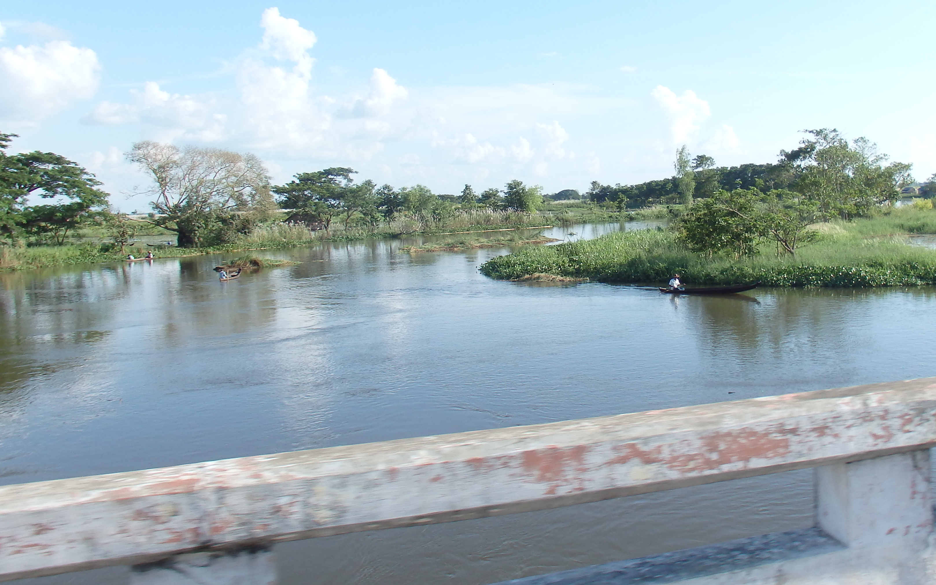 Maubin, Myanmar (Burma)